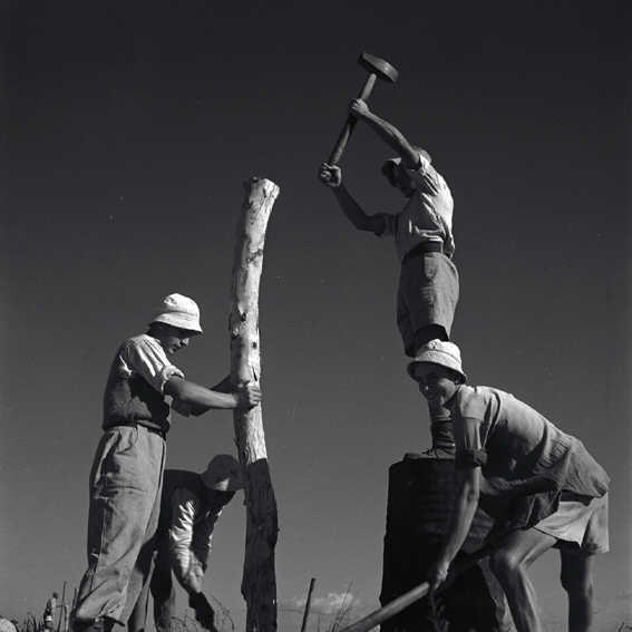 "מכמורת" - העליה למכמורת- צעירי כפר ויתקין תקעו עמוד ראשון באדמת מכמורת.